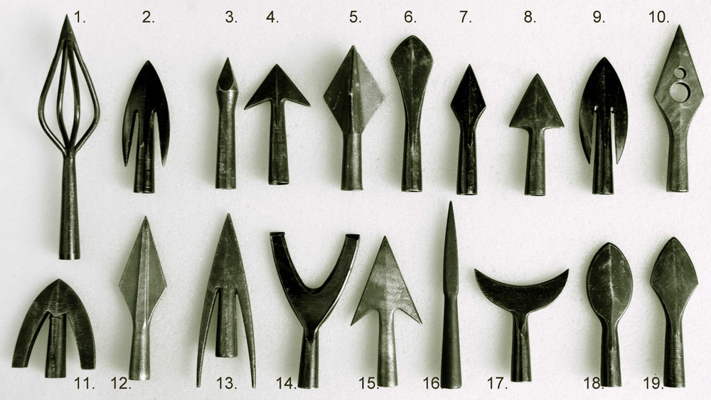 அம்புமுனைகளின் வகைகள்